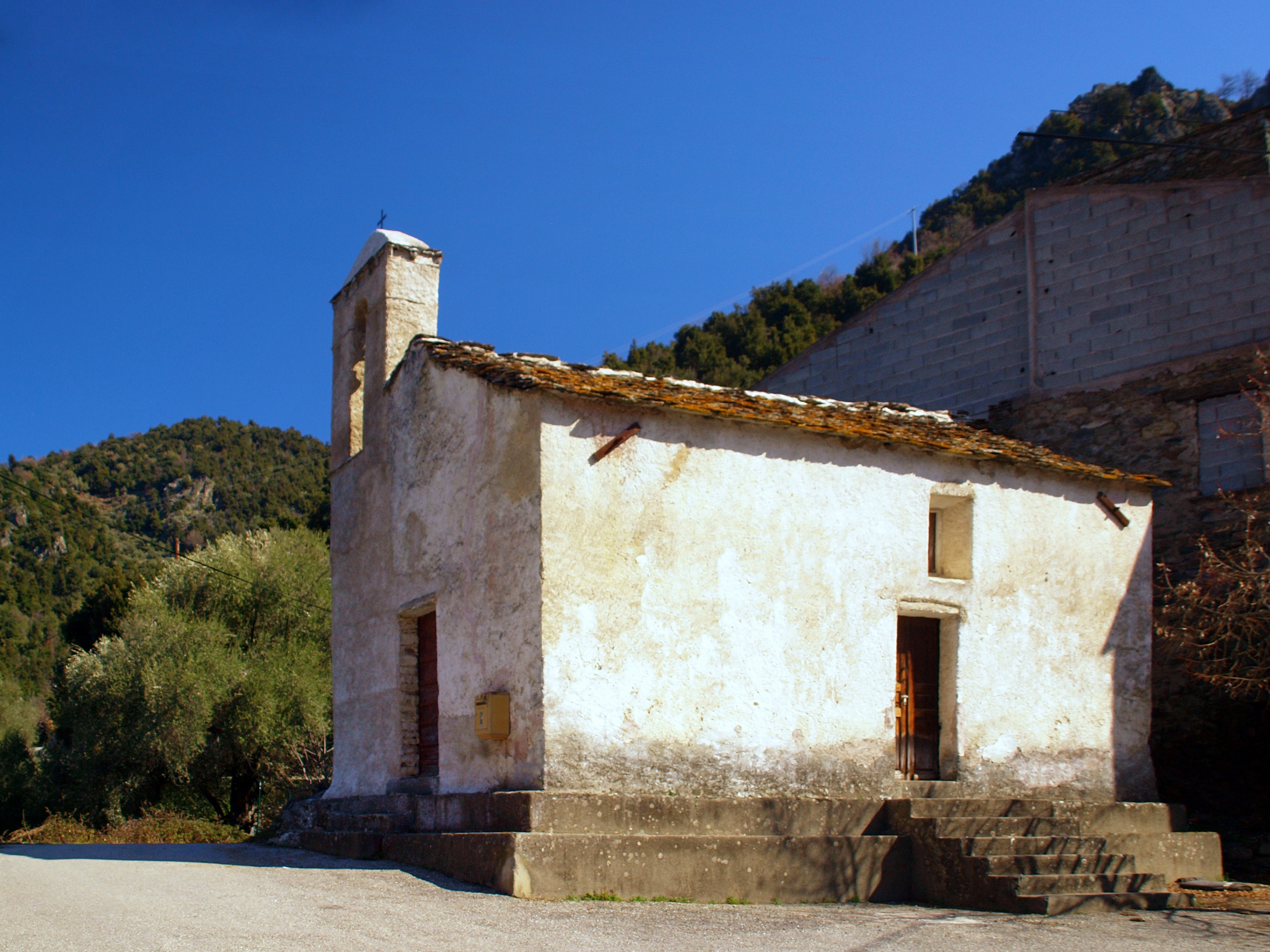 Bisinchi, Rustinu (Corse) - Chapelle Santa Lucia au hameau de Fornu